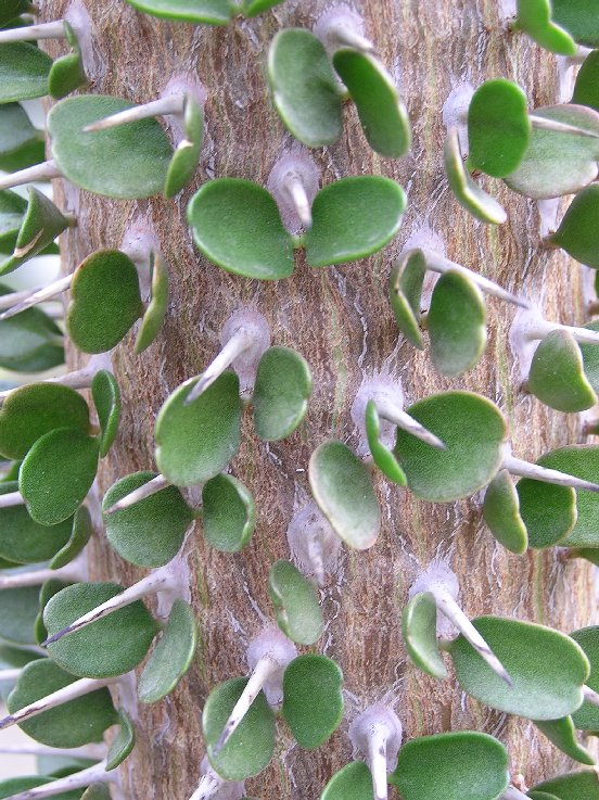 Alluaudia ascendes im Botanischen Garten Bonn.